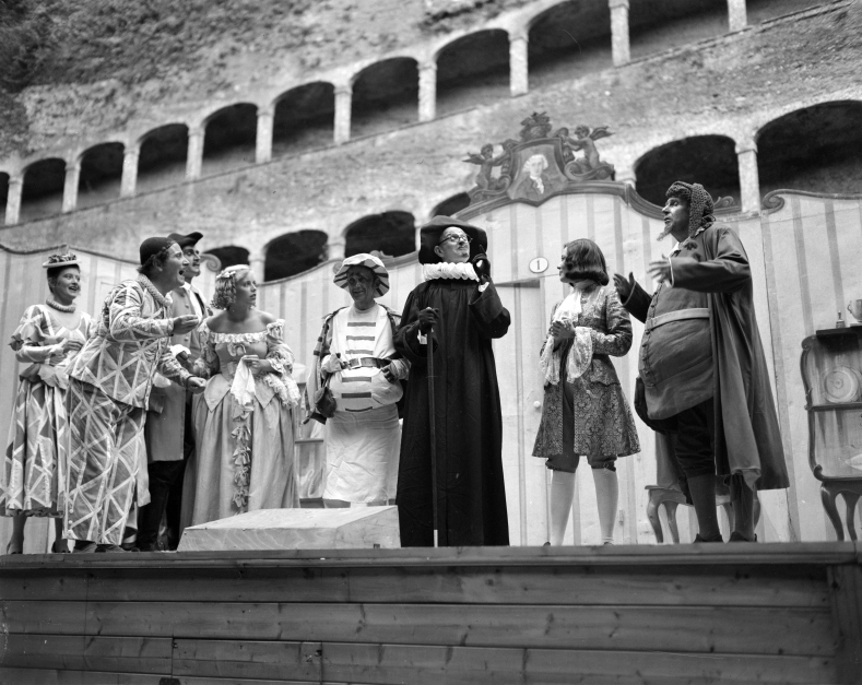 Szenenbild aus der Aufführung von Der Diener zweier Herren in der Salzburger Felsenreitschule, Regie: Hermann Thimig. Von links nach rechts: Susi Nicoletti als Smeraldina, Hermann Thimig als Truffaldino, Stefan Skodler als Silvio, Hilde Mikulicz als Rosaura, Hermann Wawra als Brighella, Otto Schmöle als Dottore, Sylvia Devez als Beatrice und Wilhelm Schmidt als Pantalone.[1]